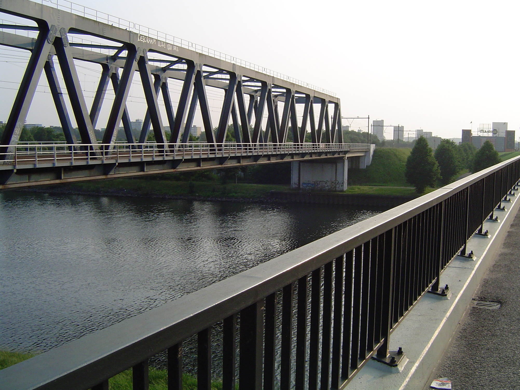 Spoorbrug Dukenburg met hoogbouw